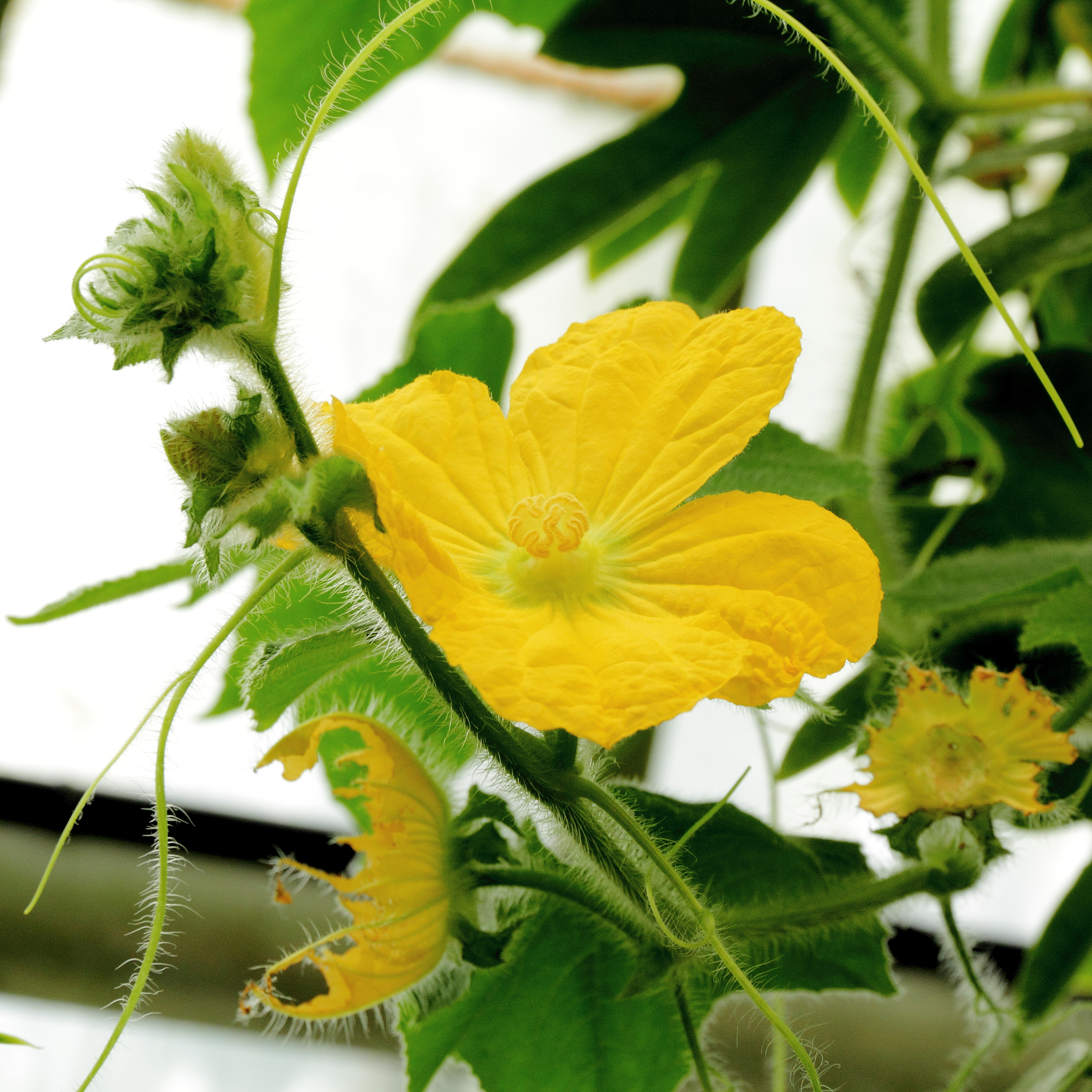 Benincasa hispida i Bergianska trädgården.